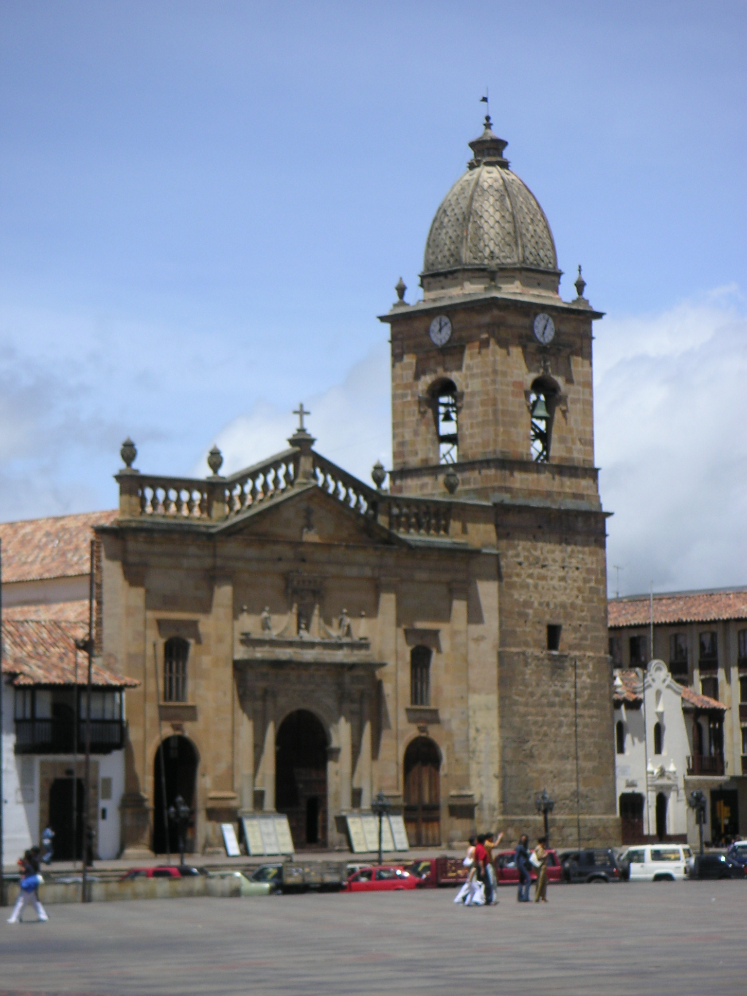 Description: Plaza Central de Tunja, Colombia Source: Louise Wolff (darina), June 2005